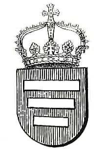 Erb sozan